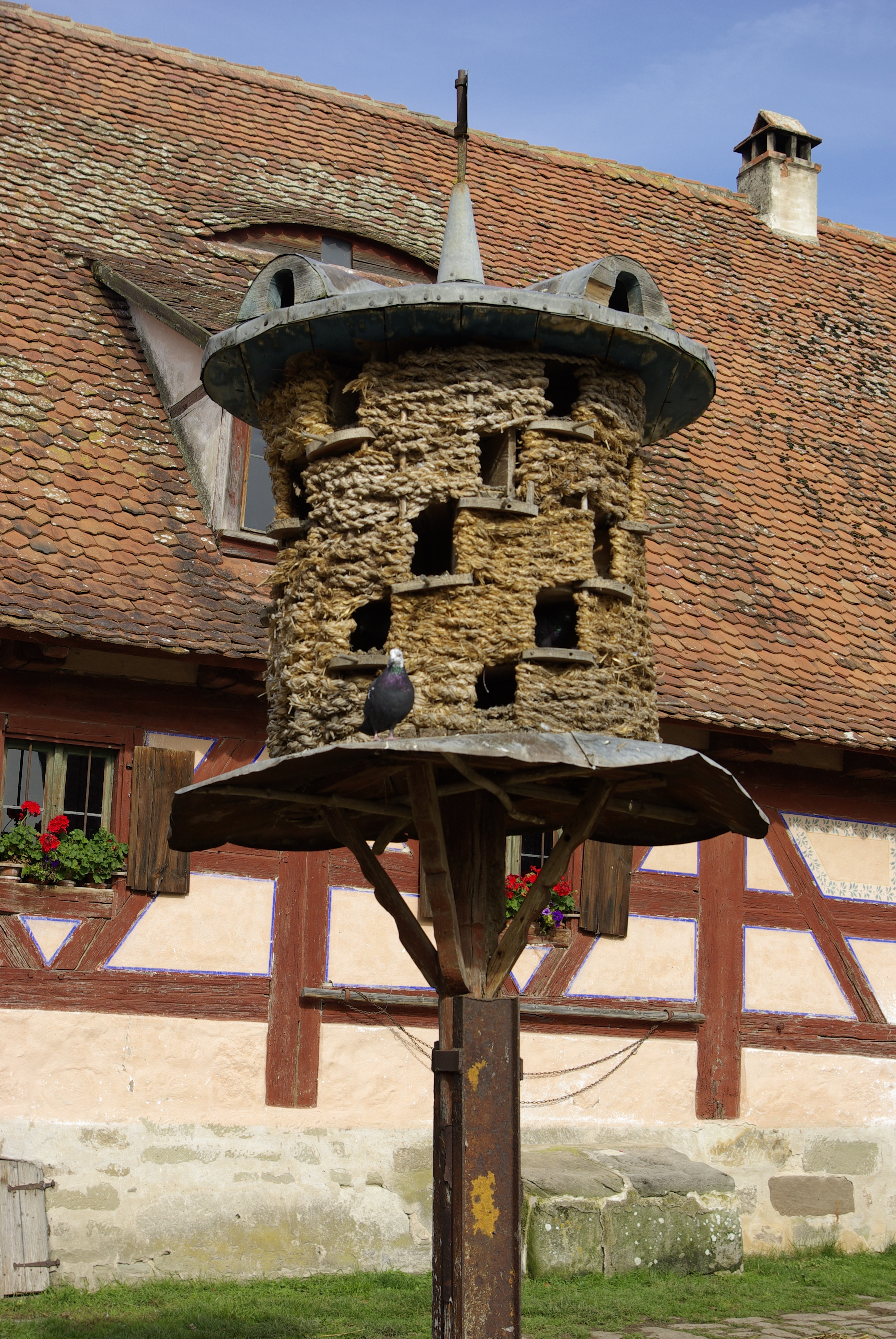 Fränkisches Freilandmuseum Bad Windsheim: Taubenschlag beim Bauernhof aus dem Fürther Umland.